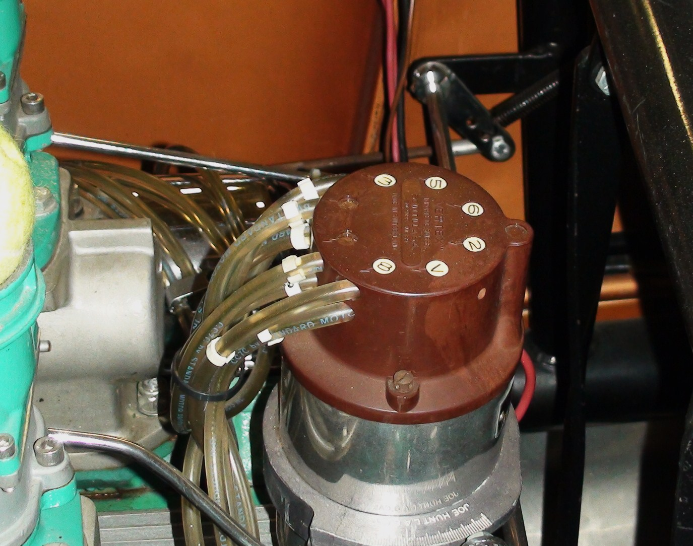 Vertex / Joe Hunt magneto